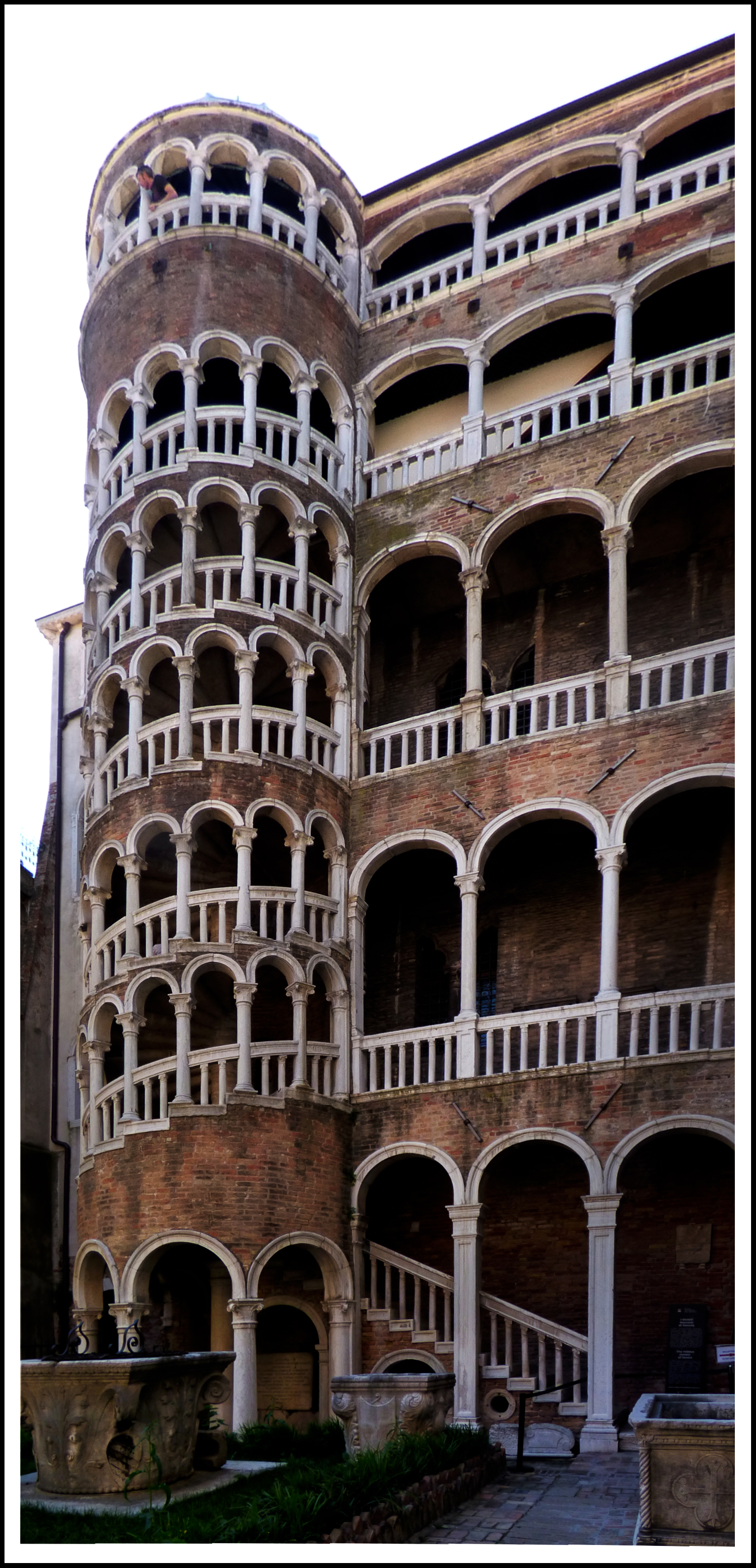 La scala esterna di Palazzo Contarini, detta "Del Bovolo"